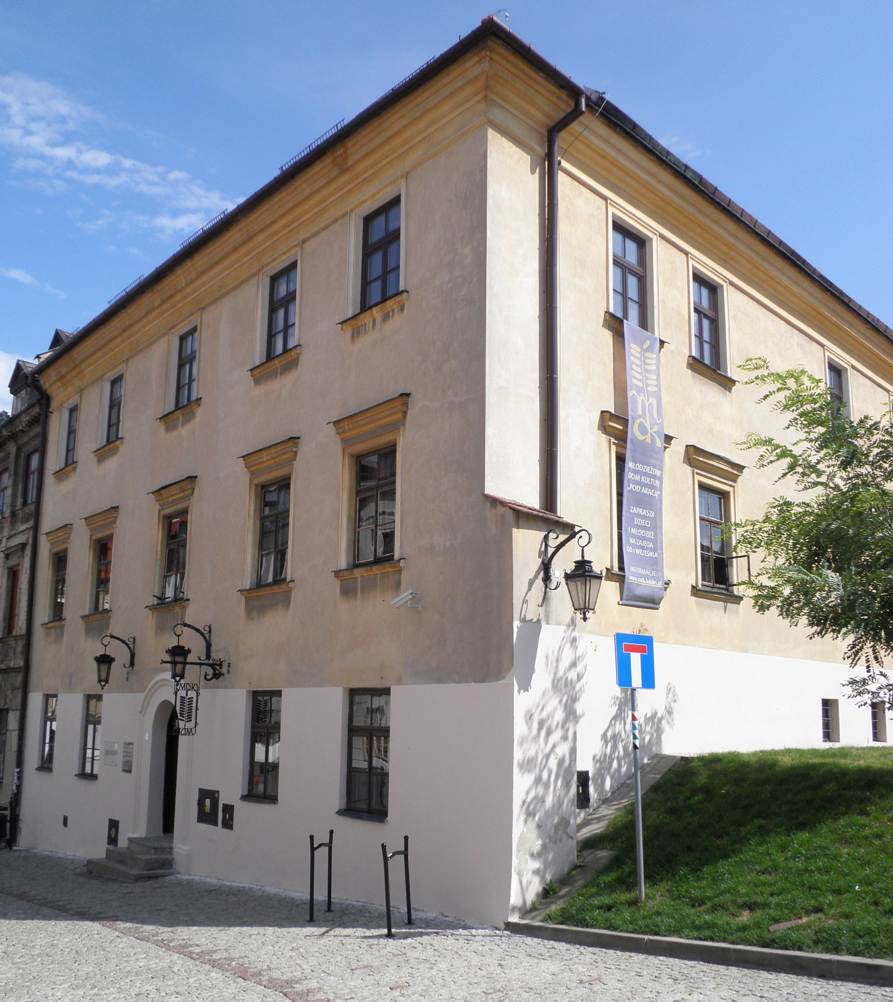 Dawna plebania przy ul. Grodzkiej 11 na Starym Mieście w Lublinie